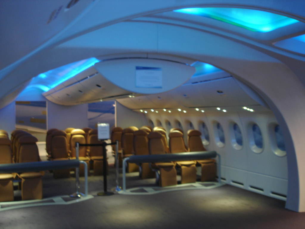 787 mockup